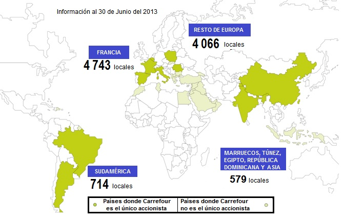 De la página web, doblado al español por mi mismo